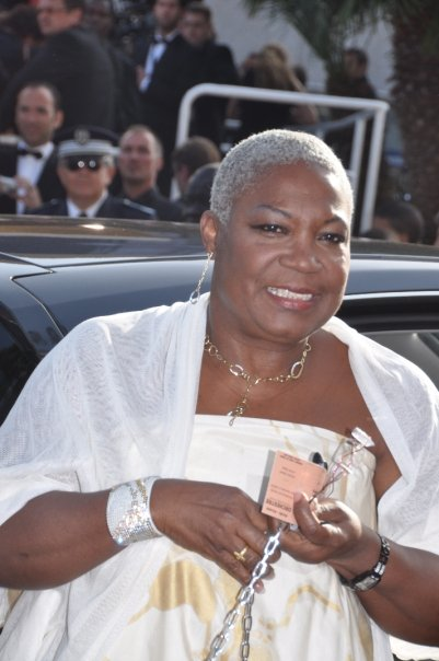 Firmine Richard au festival de Cannes